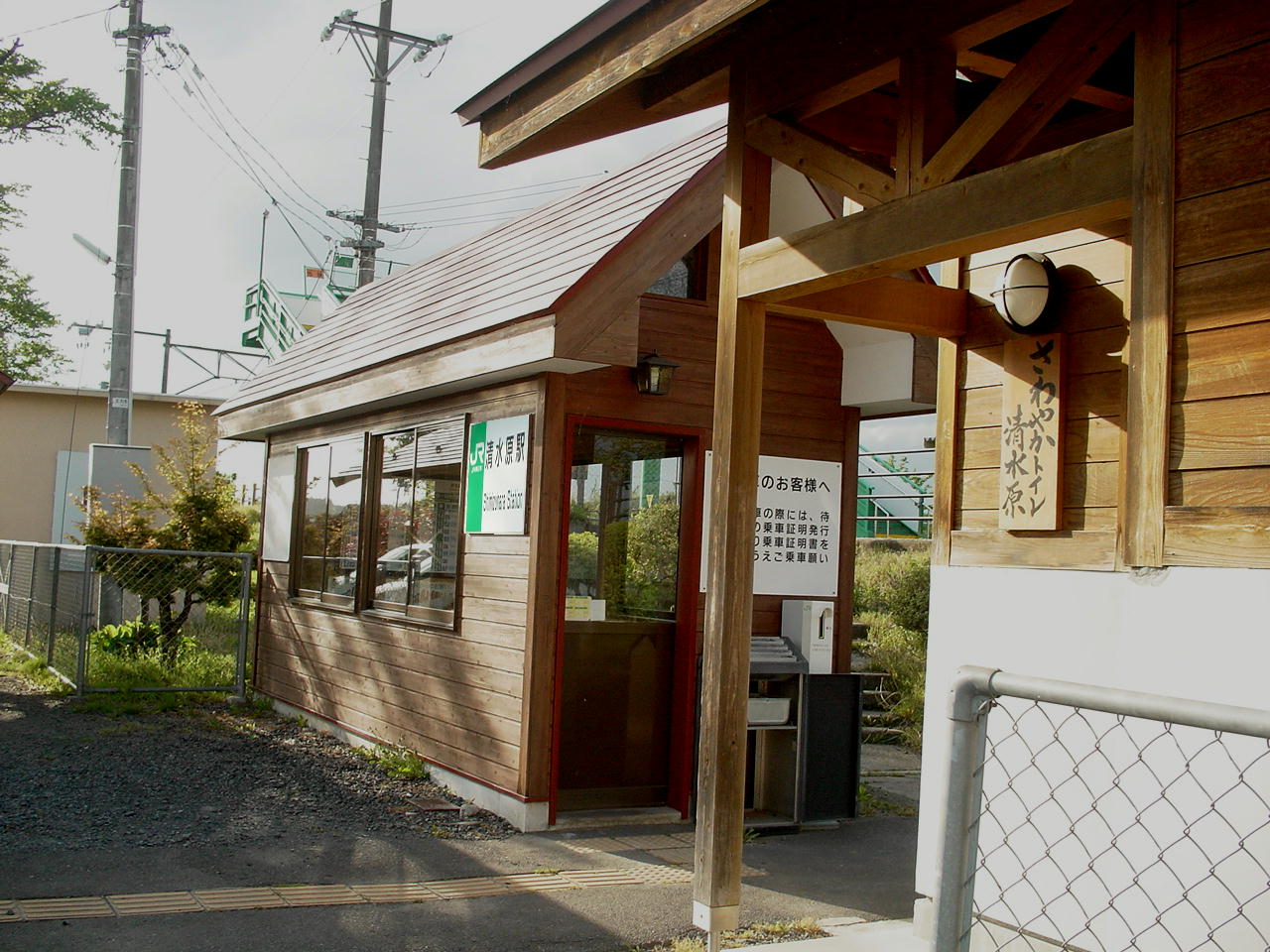 （清水原駅）